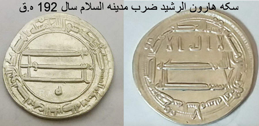 سکه هارون الرشید ضرب مدینه السلام سال 192 ه.ق